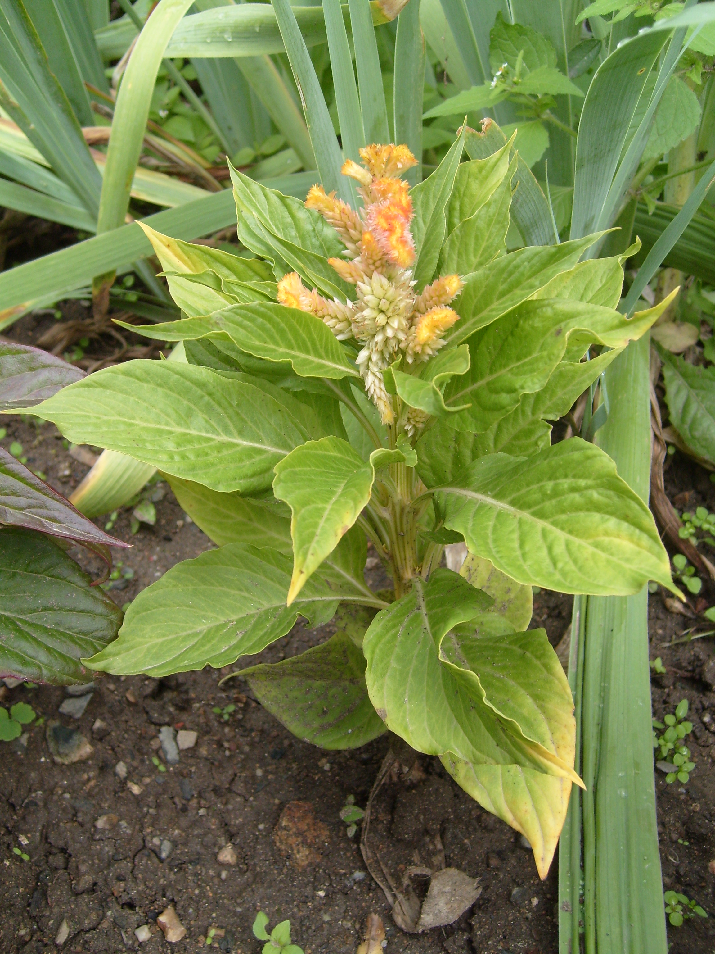 Nevadlec hřebenitý (Celosia argentea var. cristata)